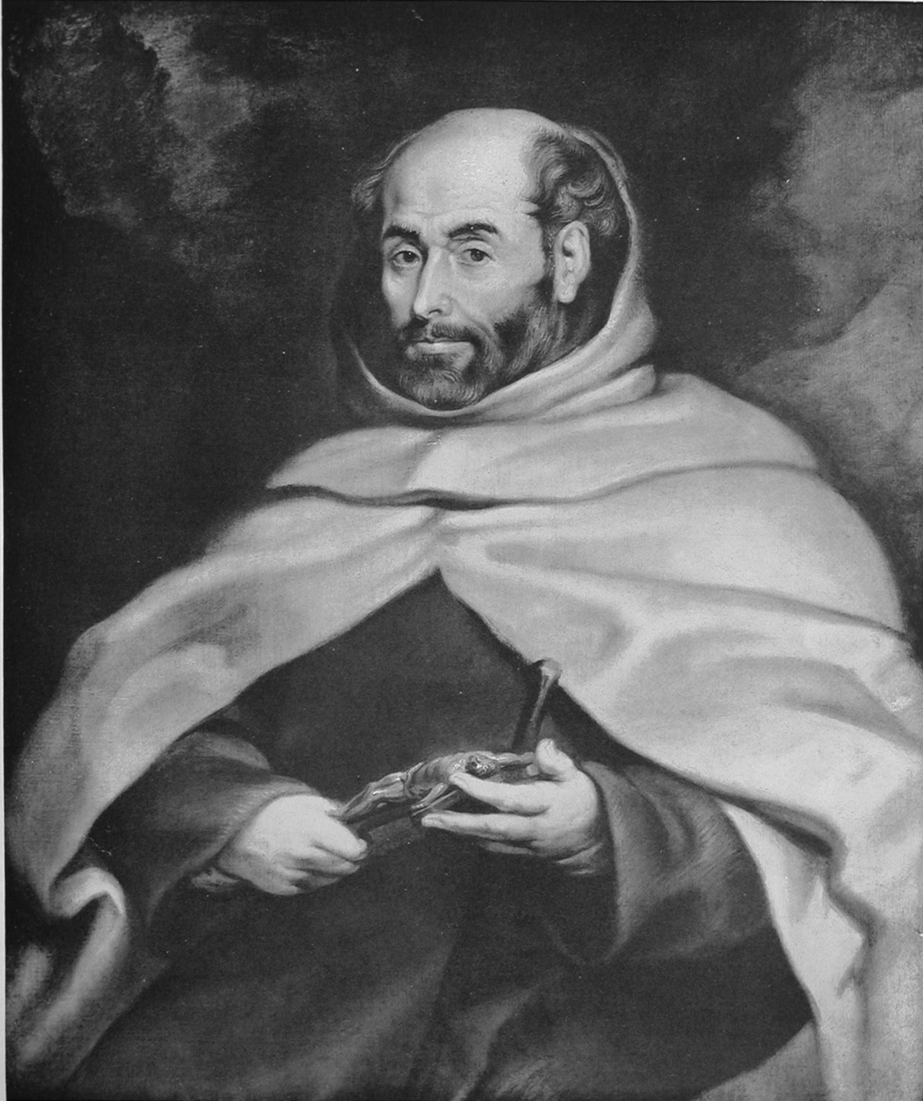 Dominik à Jesu Maria